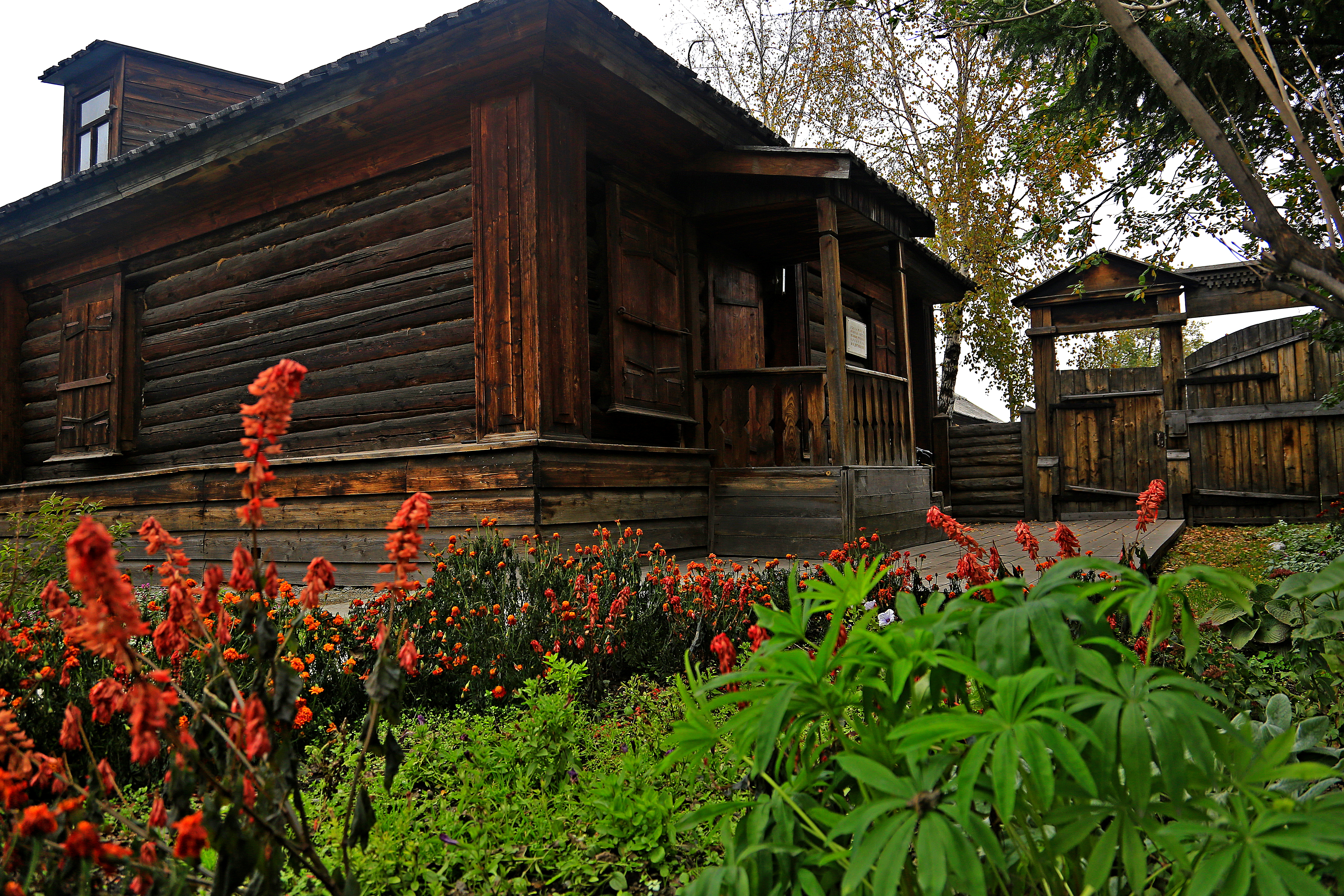 Дом, в котором в 1857 г. жил писатель Достоевский Ф.М.: улица Достоевского, 40, Новокузнецк, Кемеровская область